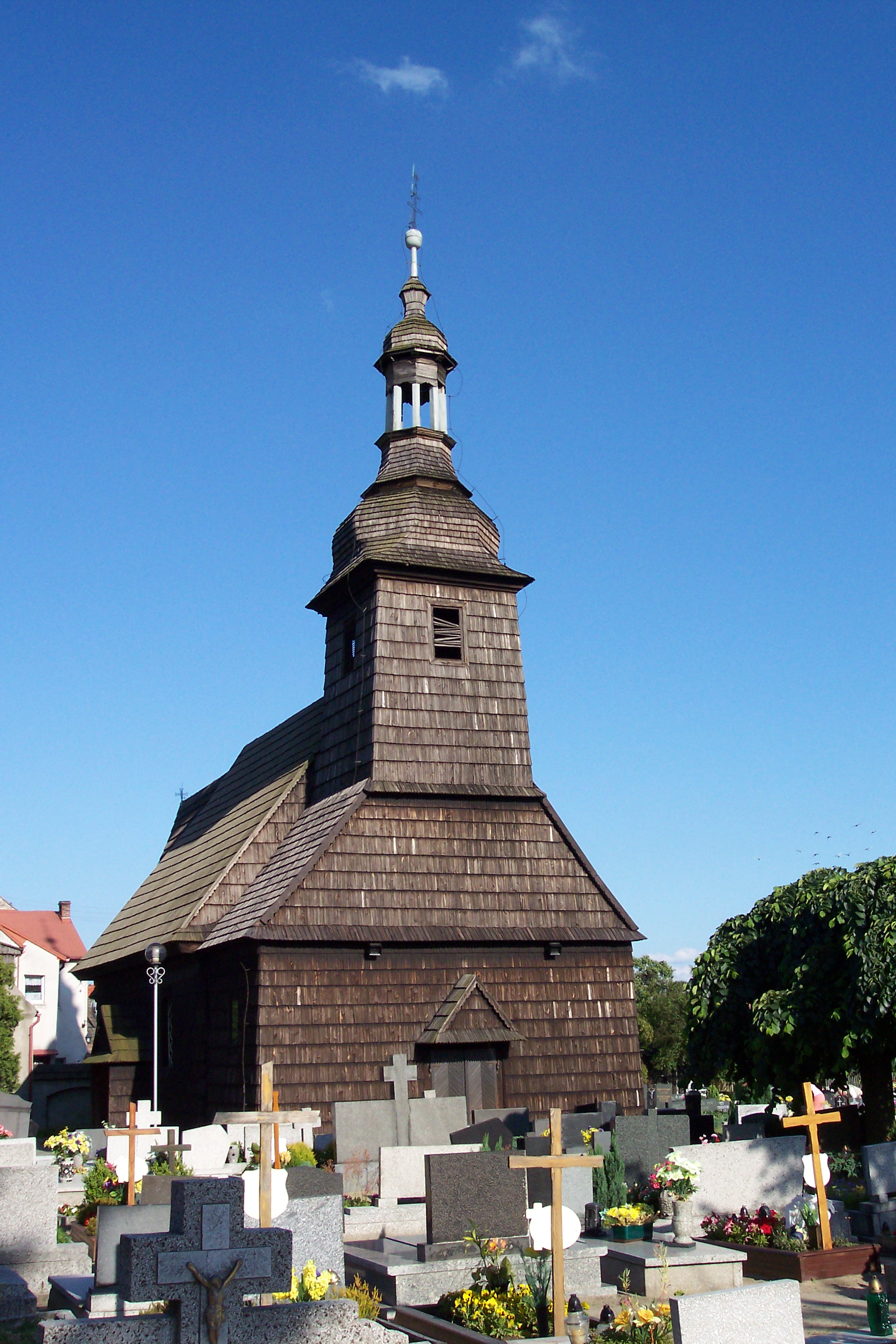 Kościół św. Walentego w Dobrodzieniu